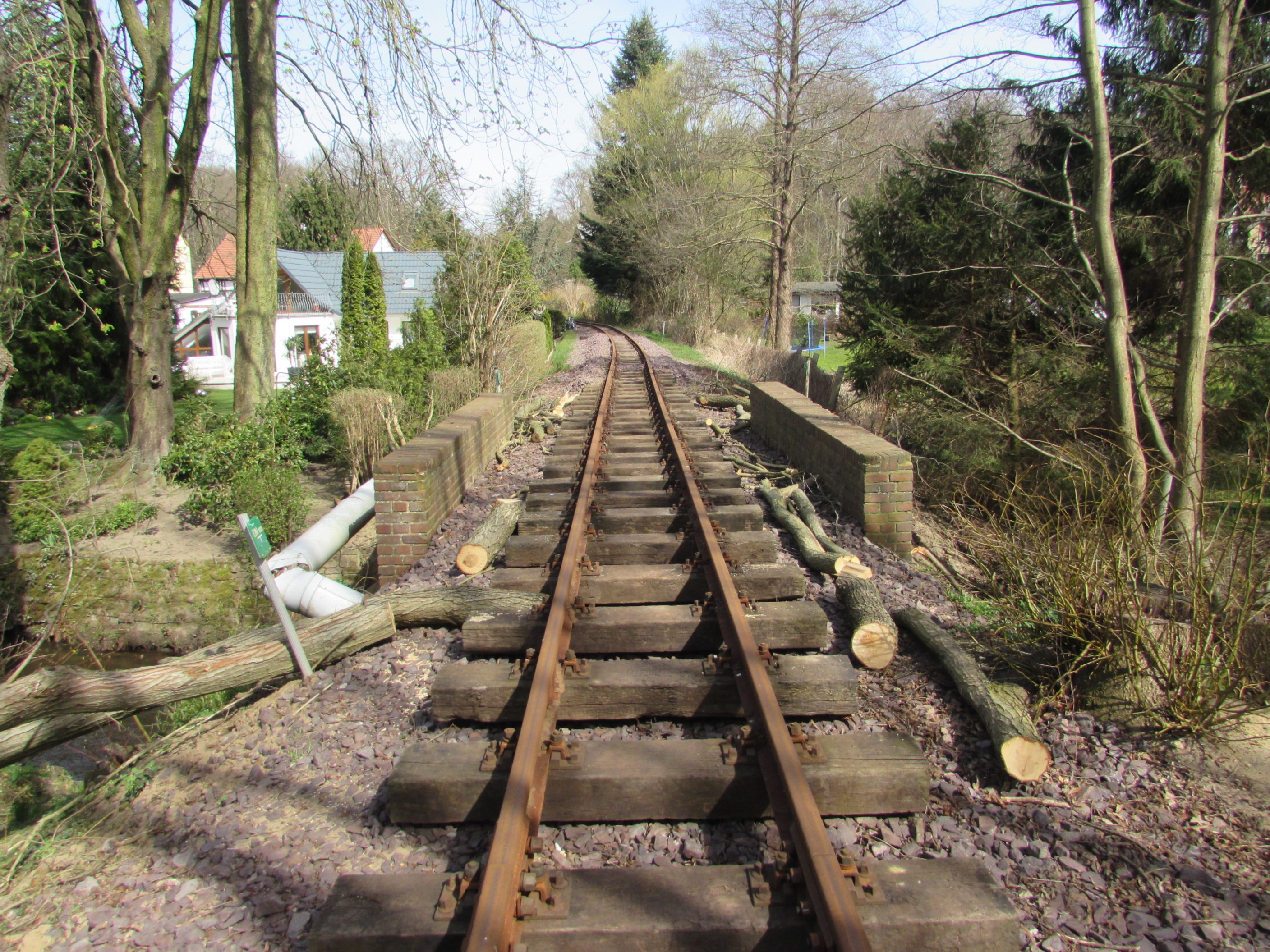 Brücke über die Gloine in Magdeburgerforth, Kleinbahnen des Kreises Jerichow I